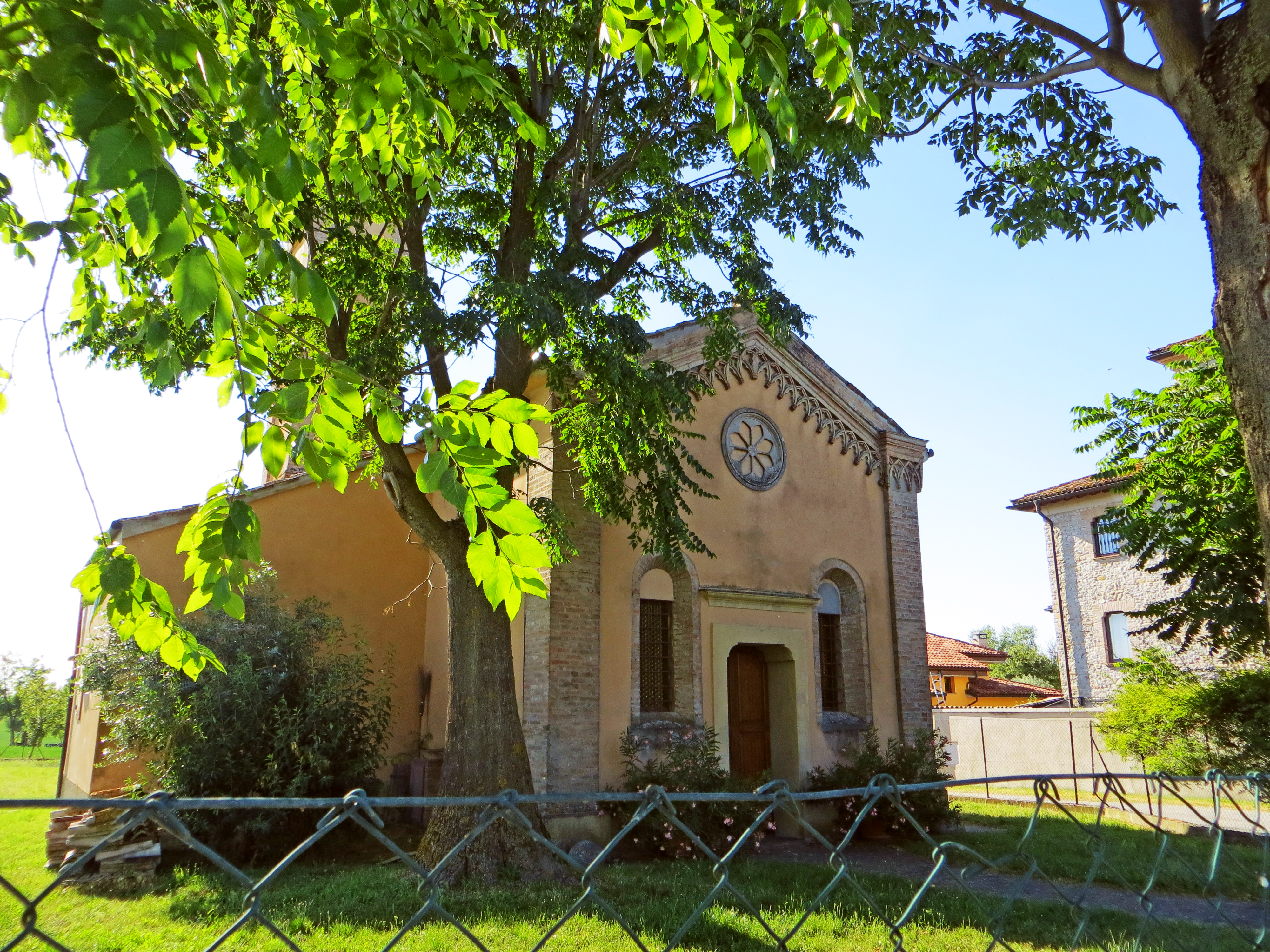 Oratorio di San Rocco (Casale, Felino) - facciata e lato sud